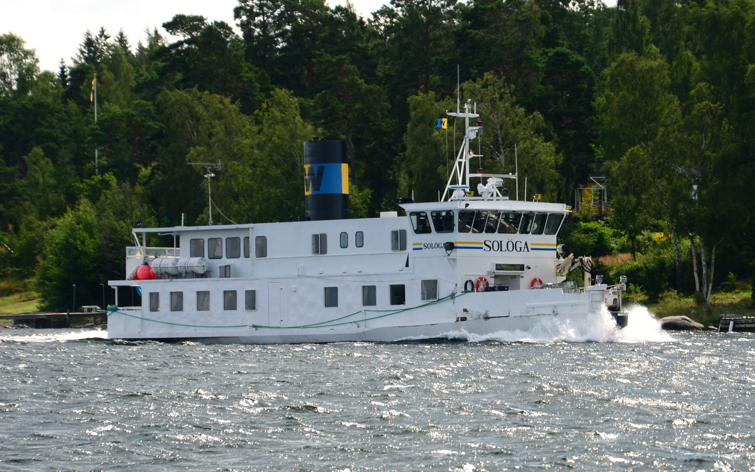 Vaxholmsbolagets fartyg M/S Solöga.